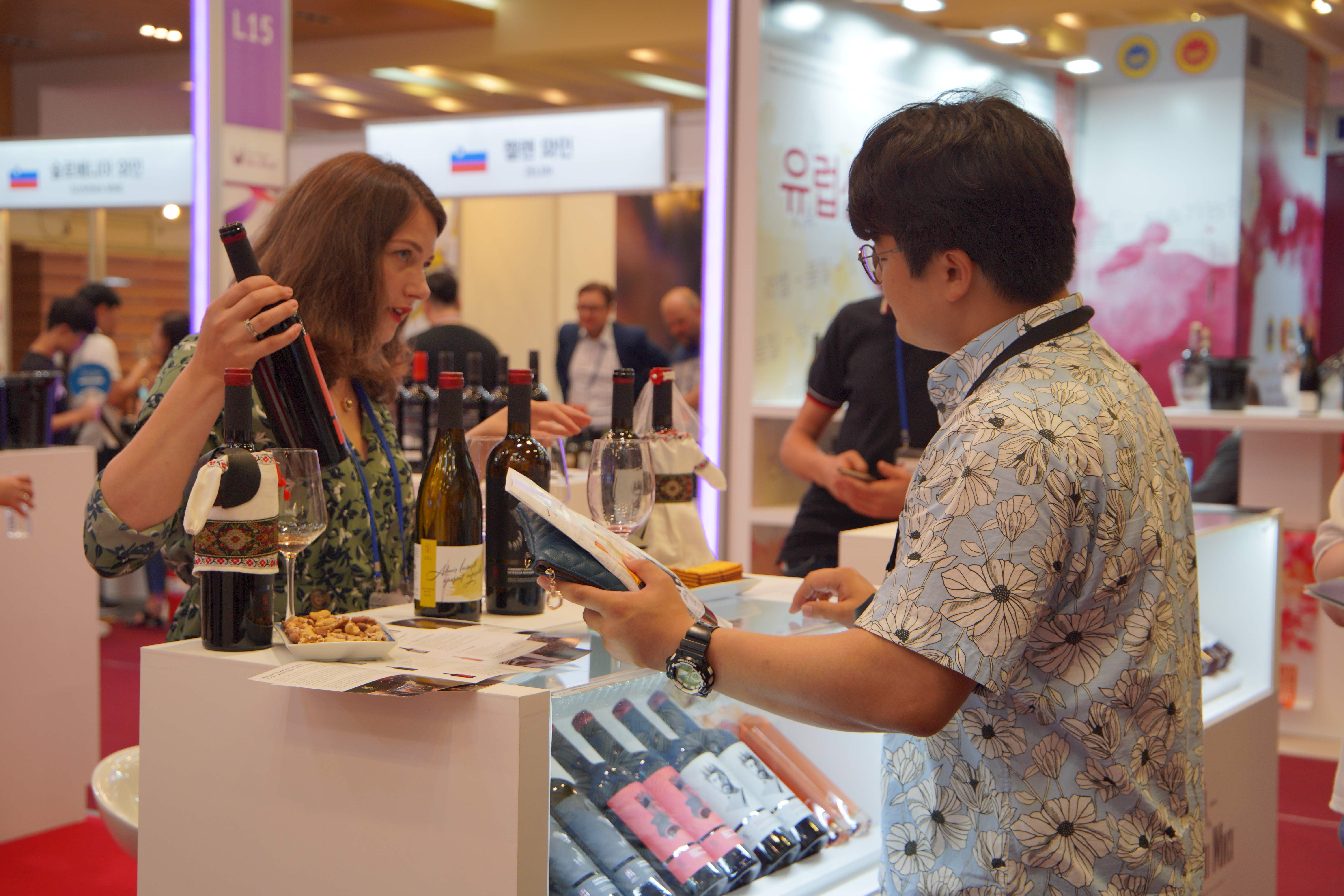 2019 대전국제와인페스티벌 (7)